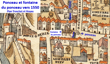 Ponceau et fontaine de la rue St-Denis vers 1550